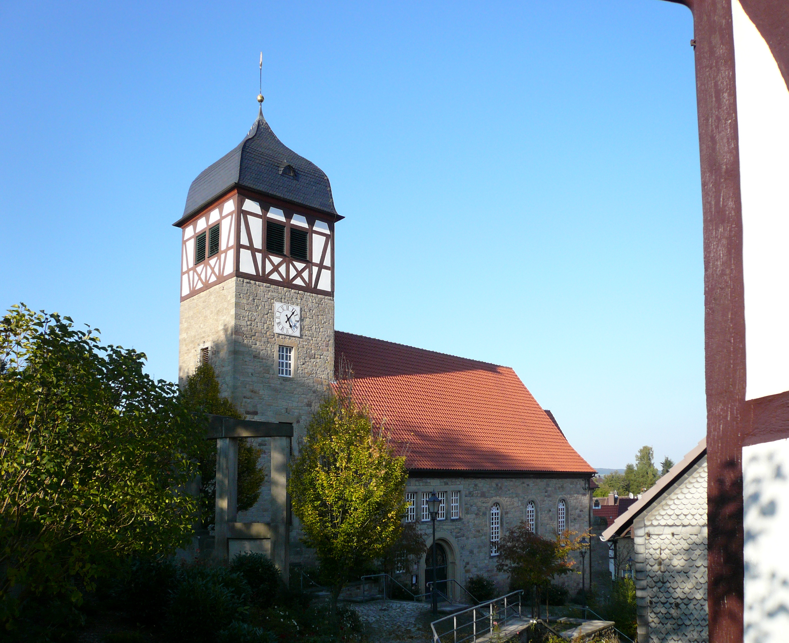 Ev.-luth. Kirche St. Martini in Adelebsen, Landkreis Göttingen, Niedersachsen. Langhaus im Kern mittelalterlich, Turm 1796 neu errichtet, Fachwerkaufsatz und Turmhaube um 1900